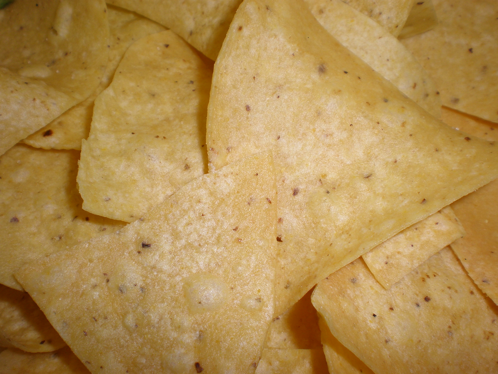 Tortilla chips